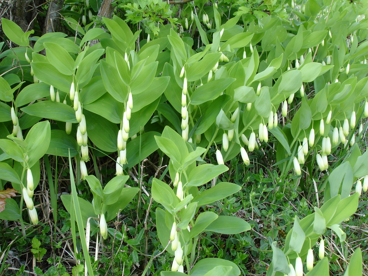 Polygonatum odoratum var. odoratum/Sceau de Salomon odorant au Fondry des Chiens à Nismes.